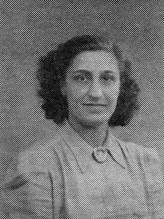 Portrait de Cécile Cerf (1916-1973)